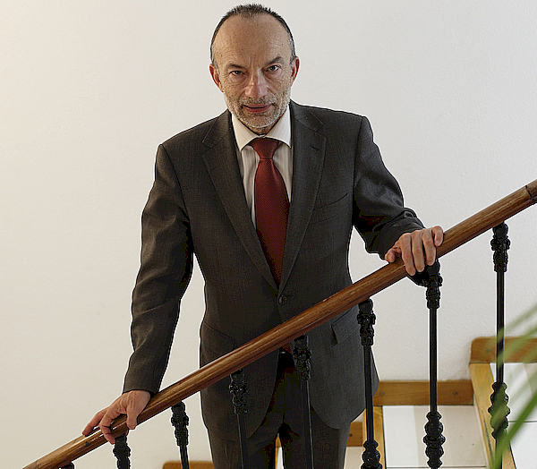 Ramón Tejedor Sanz, Director-Gerente del IAF